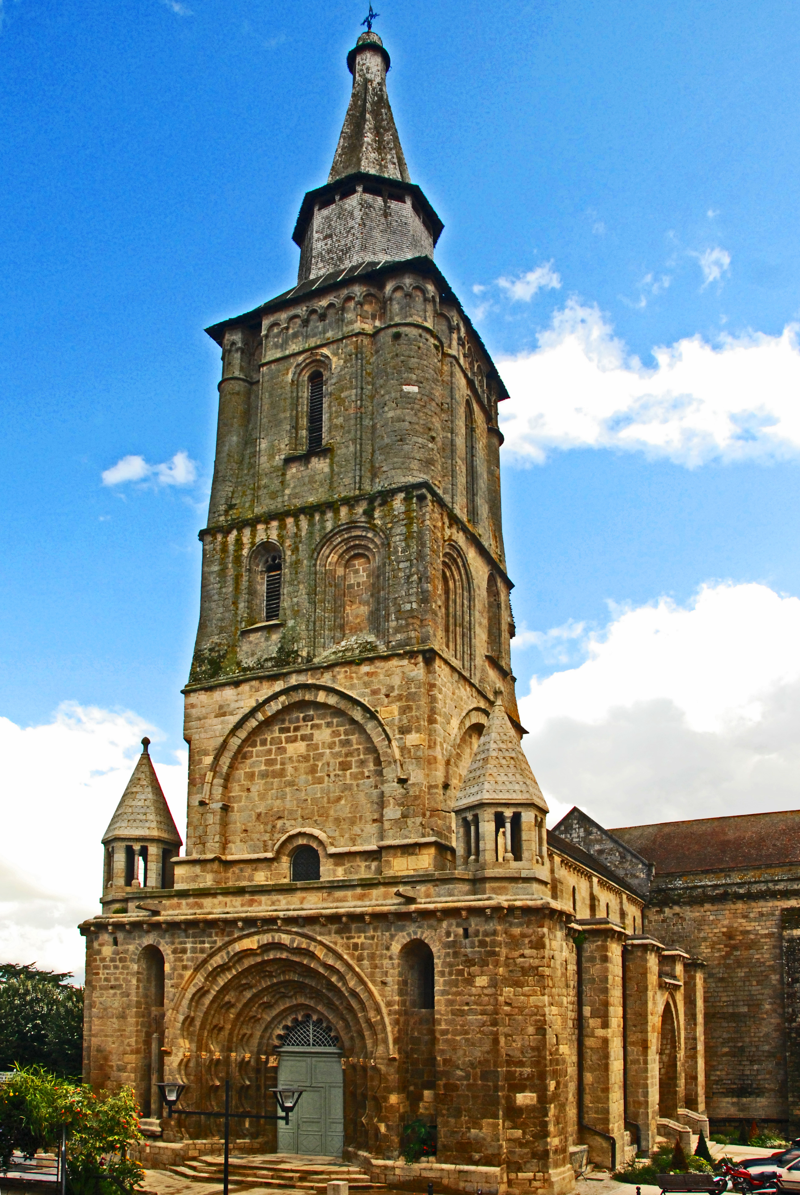 N.-D. de La Souterraine, Westwerk von SW